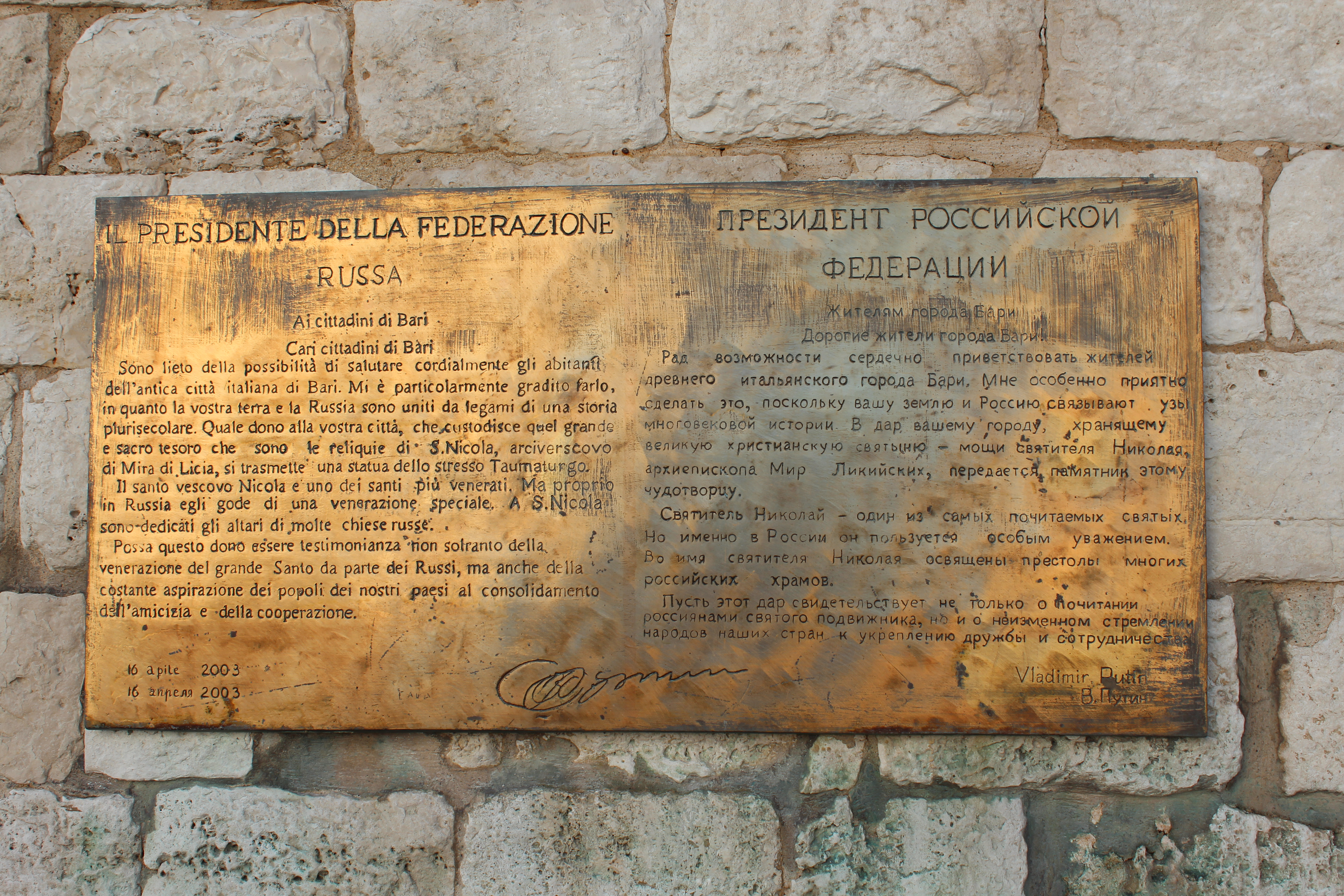 basilica di San Nicola Targa in segno di amicizia tra Bari e Mosca con San Nicola come collante, firmata dal presidente russo Vladimir Putin This is a photo of a monument which is part of cultural heritage of Italy.